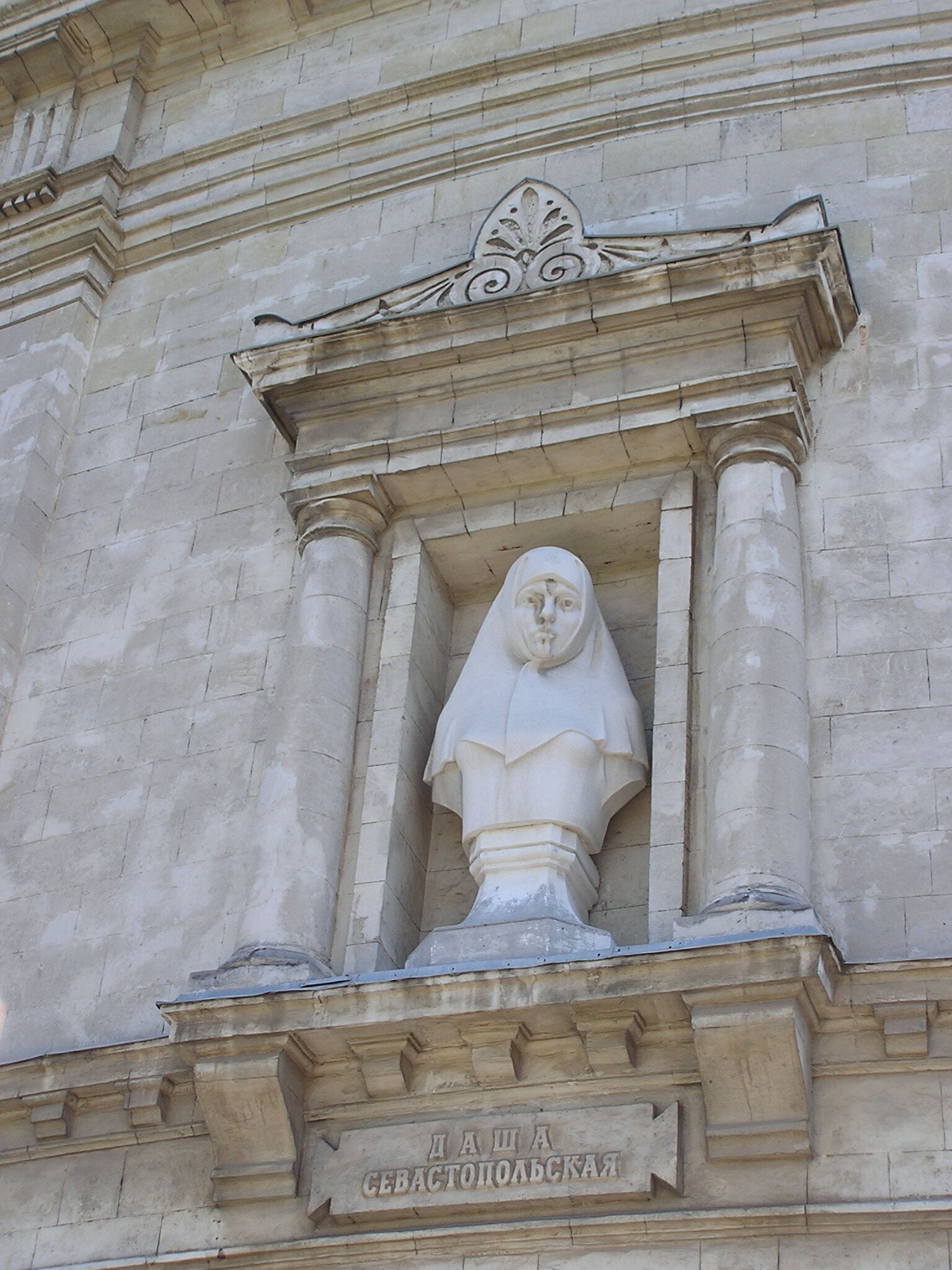 Даша Севастопольская, скульптура на здании панорамы обороны Севастополя